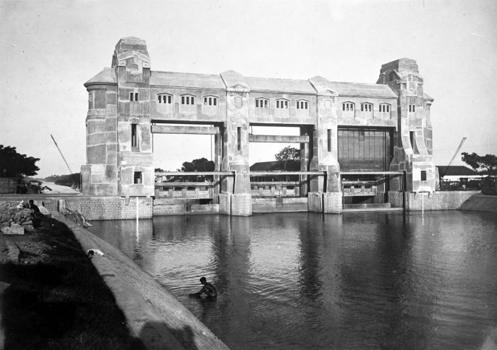 Repronegatief. Bovenstrooms aanzicht van de bandjirsluis Wonokromo (met schotbalkloods), Soerabaja, Oost-Java